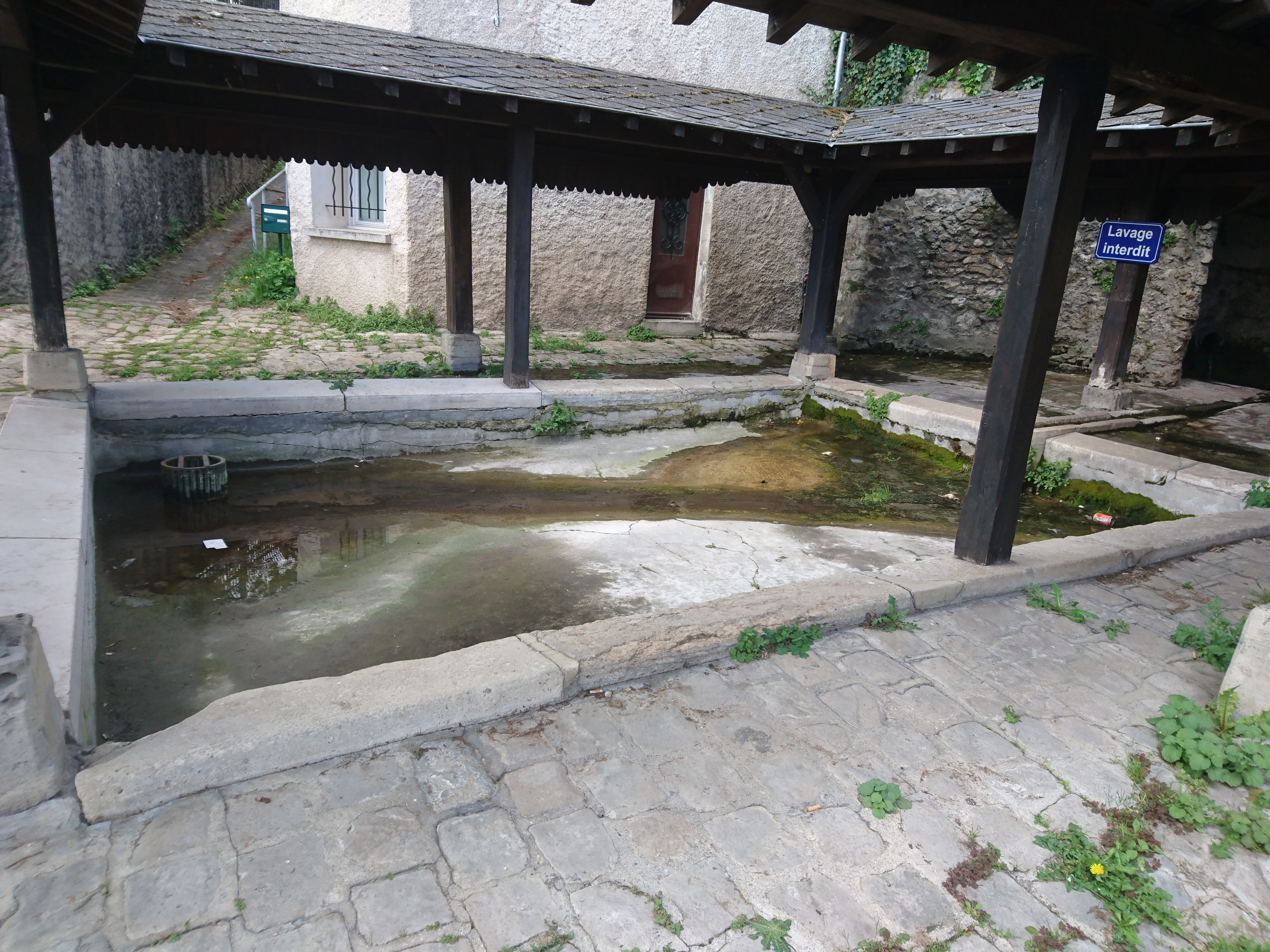 Ancien lavoir d'Athis-Mons. Ce lavoir entouré de cloisons de bois a servi des années 1860 à 1950, avant l'apparition des machines à laver. Il est alimenté par une source aménagée en fontaine.